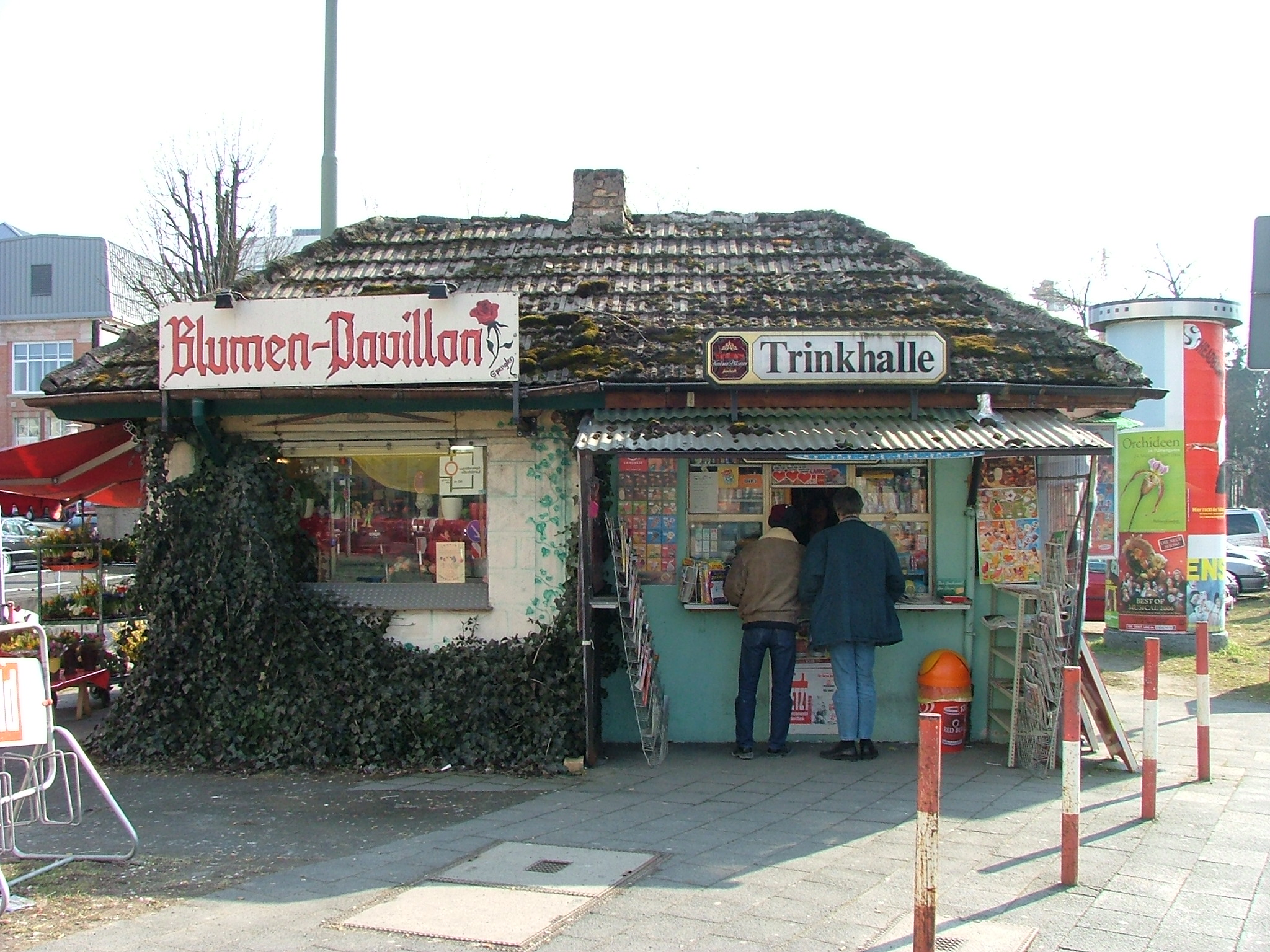 Wasserhäuschen am Stadtkrankenhaus, Offenbach am Main